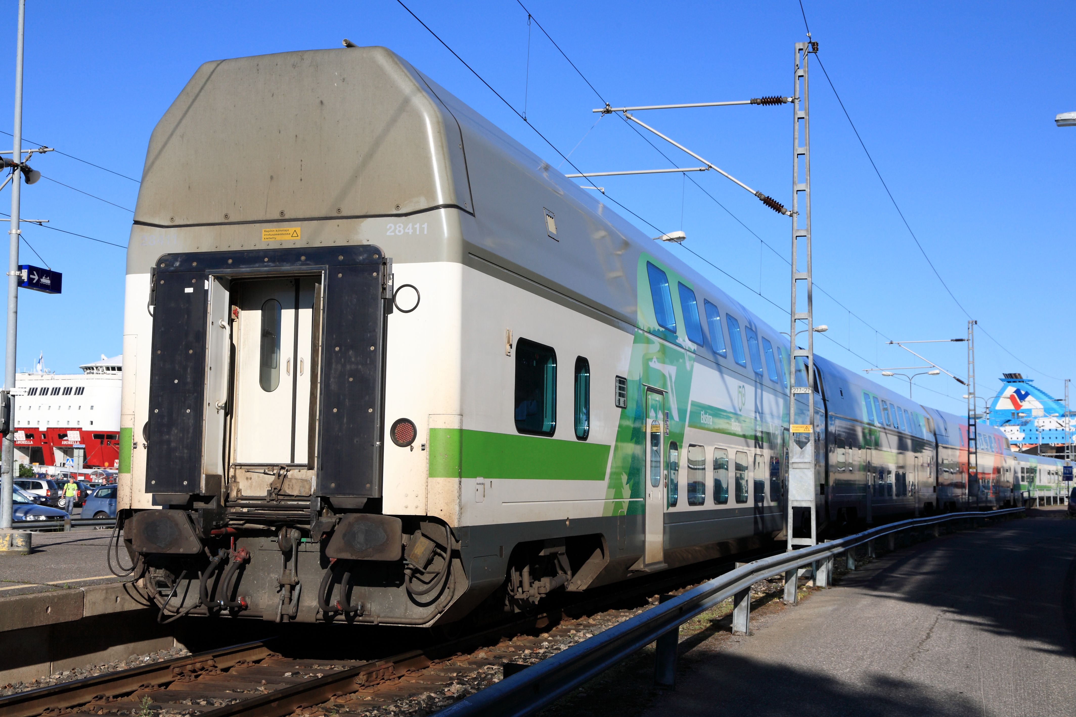 Intercitywagenzug mit Doppelstockwagengruppe am Zugschluss, angekommen von Helsinki. Der Anstrich in weiß und grün wurde für das 150jährige Eisenbahnjubiläum in Finnland eingeführt.